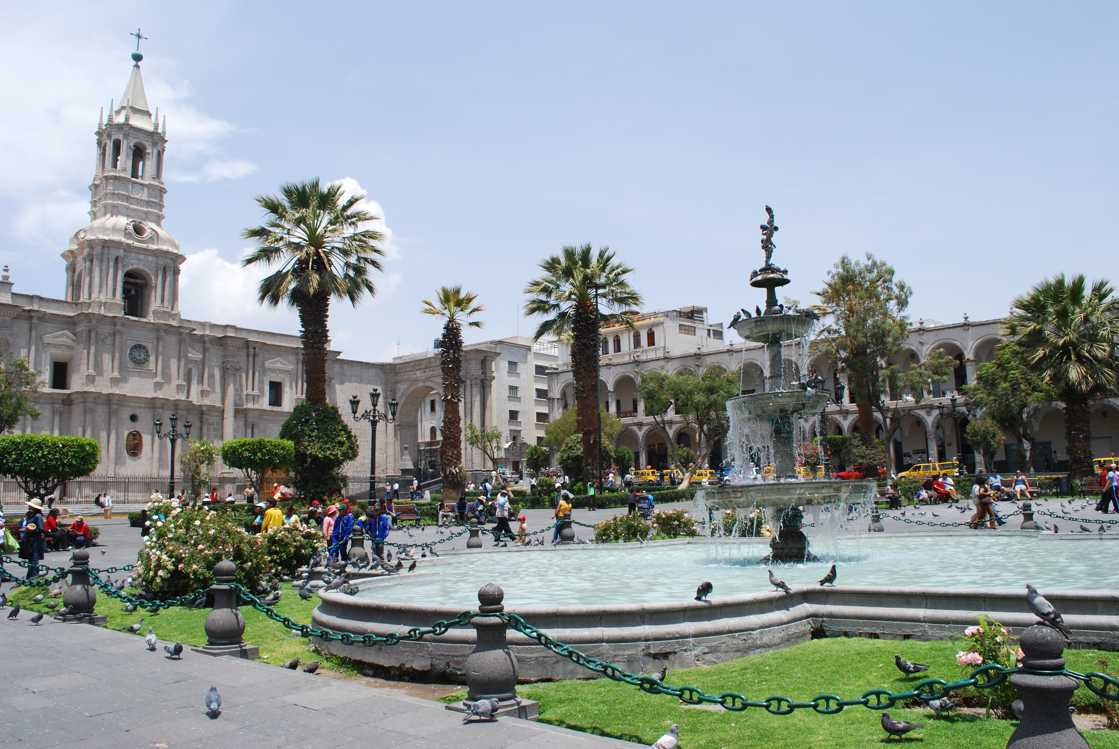 plaza principal de arequipa